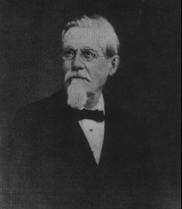 Foto de Jaime Nunó, compositor de la música del Himno Nacional Mexicano